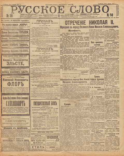 Русское слово — ежедневная газета. Выходила в Москве с 1895 по 1917 гг.